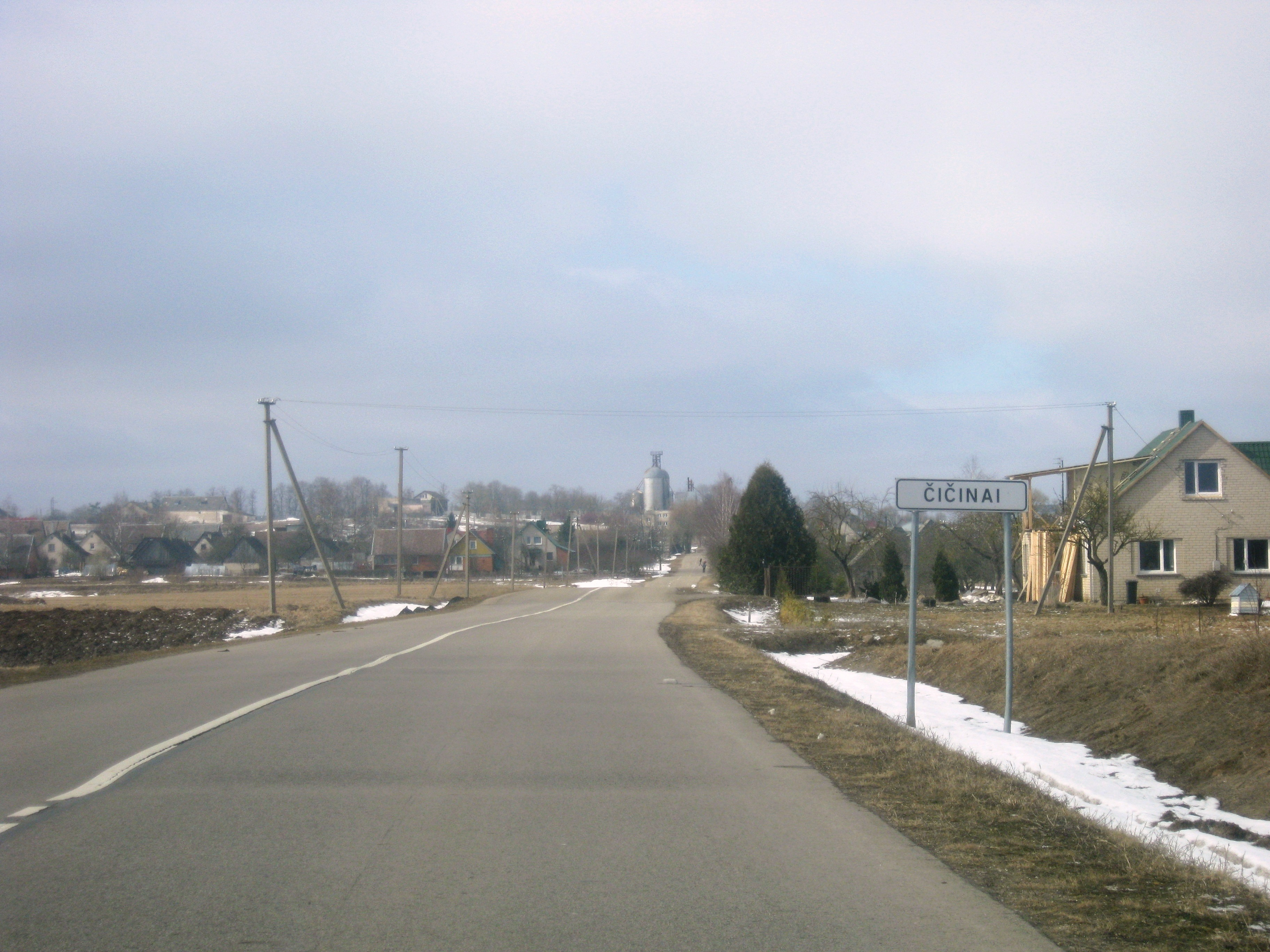 Čičinai, Jonavos rajonas.